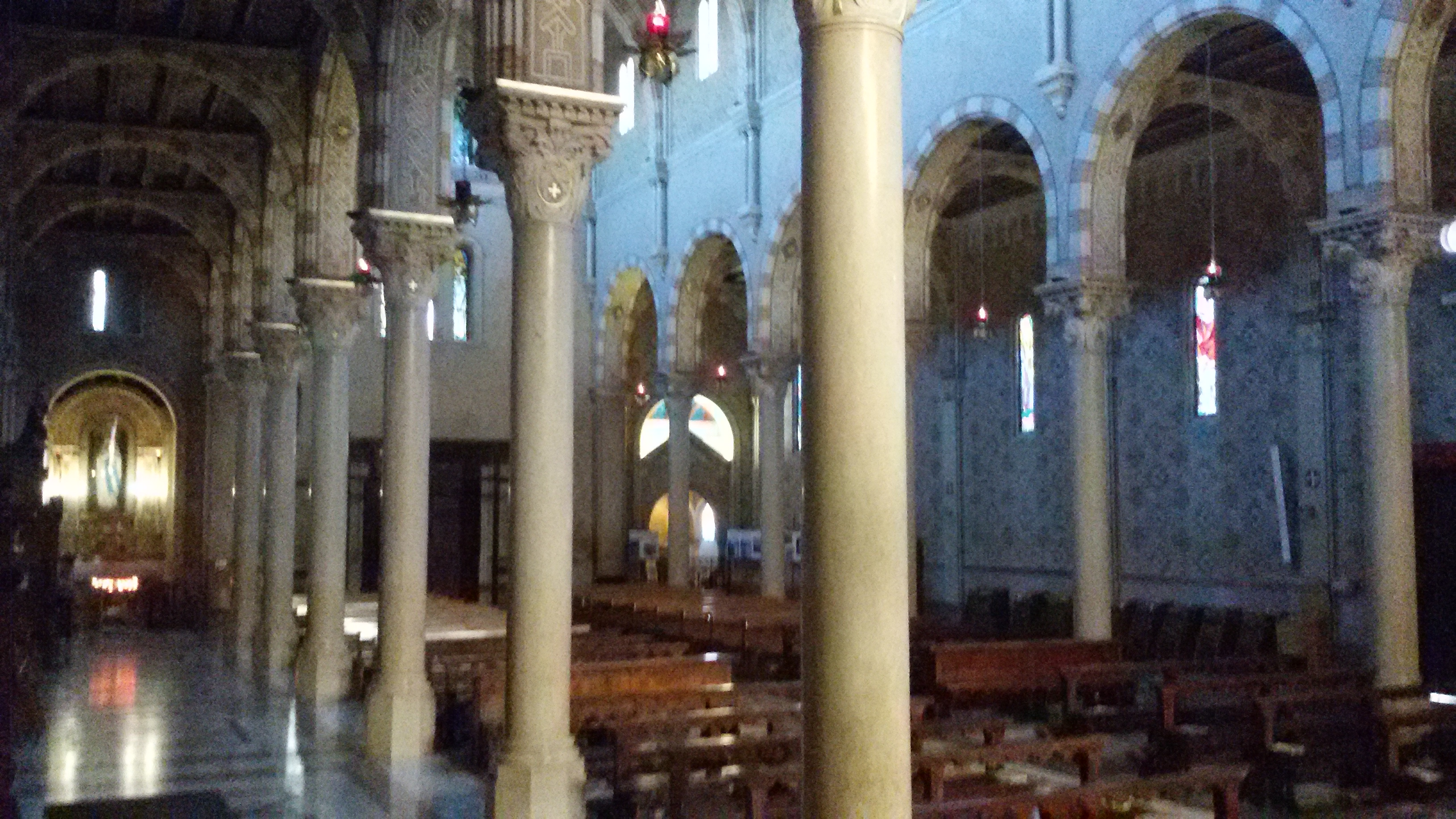 Chiesa di Santa Cristina Quinto di Treviso